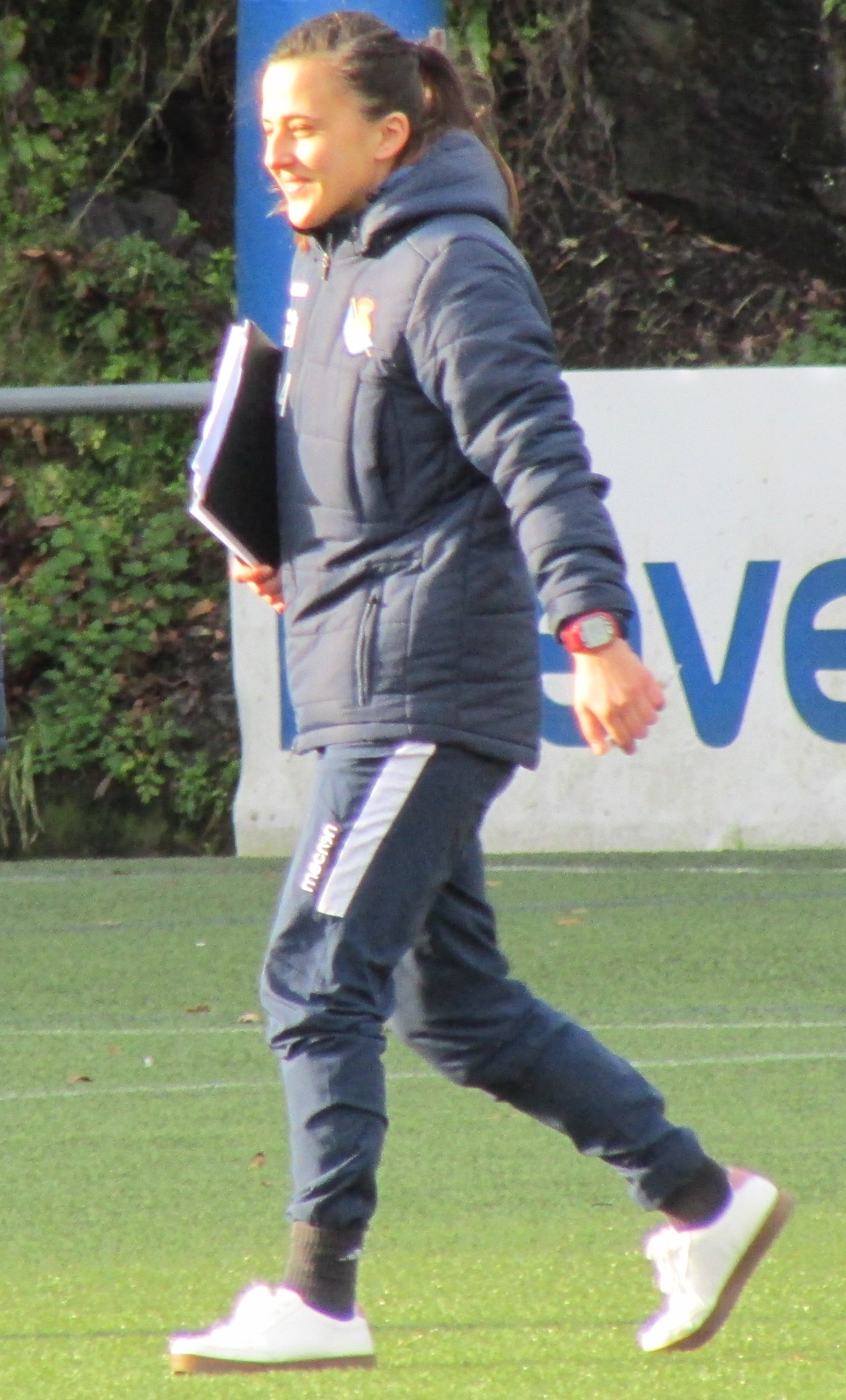 Futbolista Real Sociedad